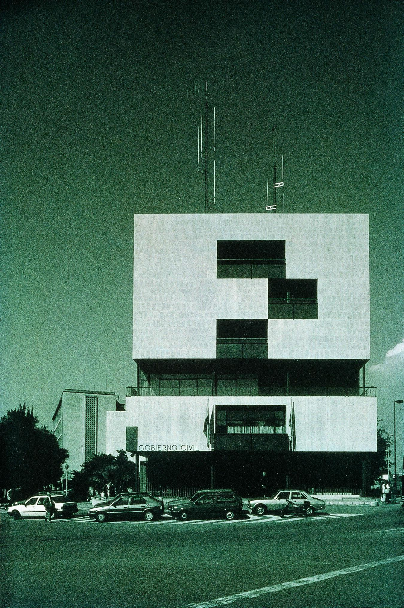 Vista antigua de la fachada del Gobierno Civil de Tarragona